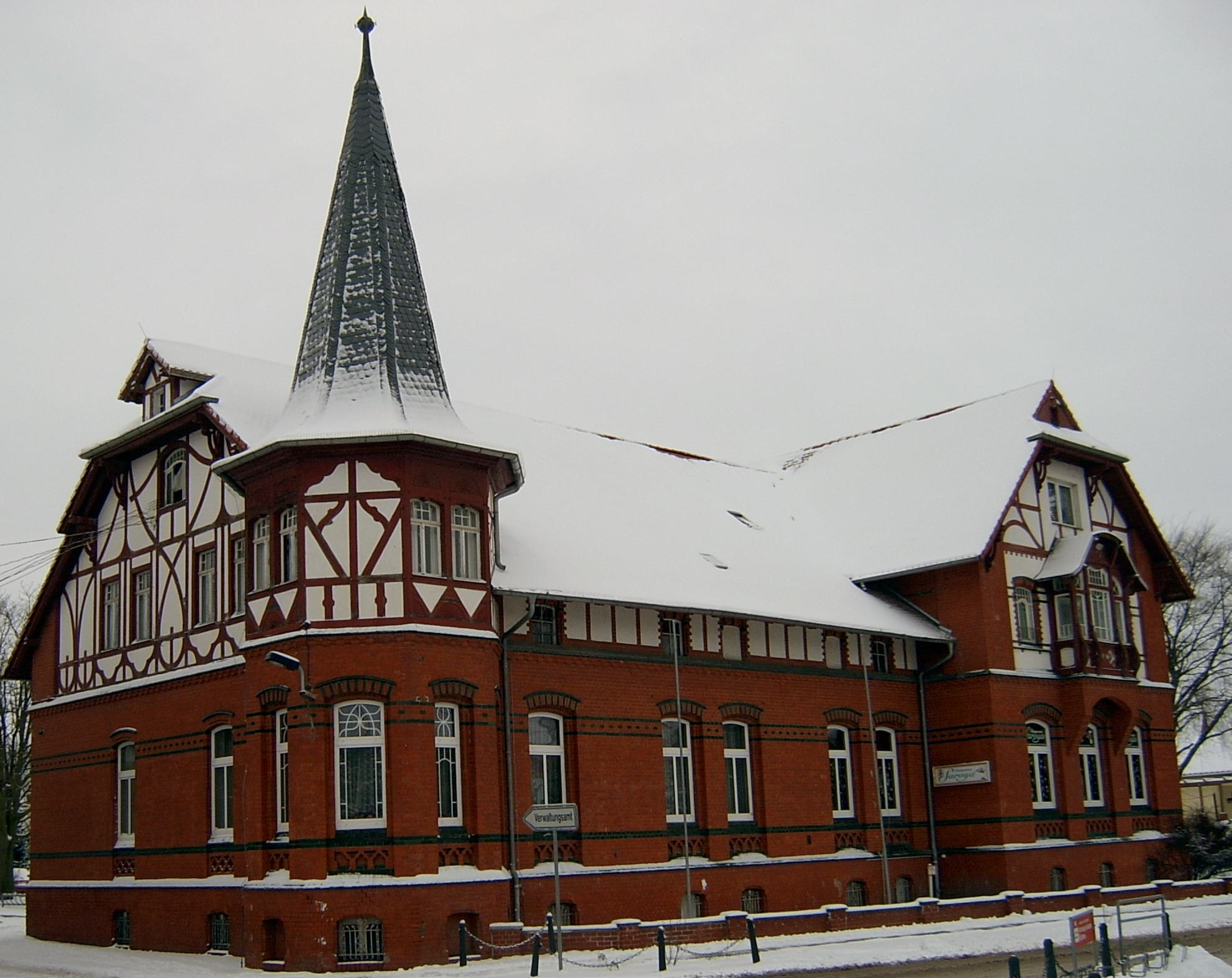 Haus in Weißandt-Gölzau